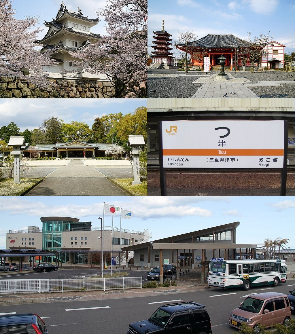 三重県津市のモンタージュ画像。